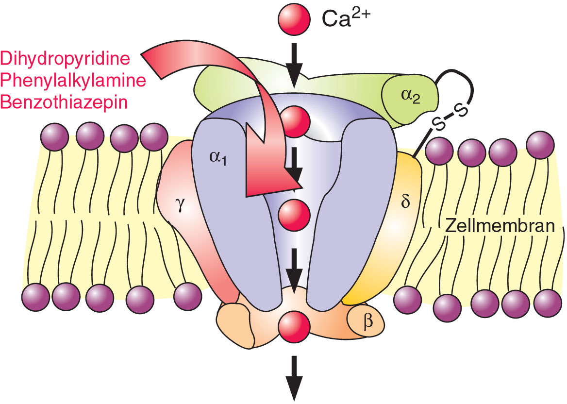 Schema eines Calciumkanals